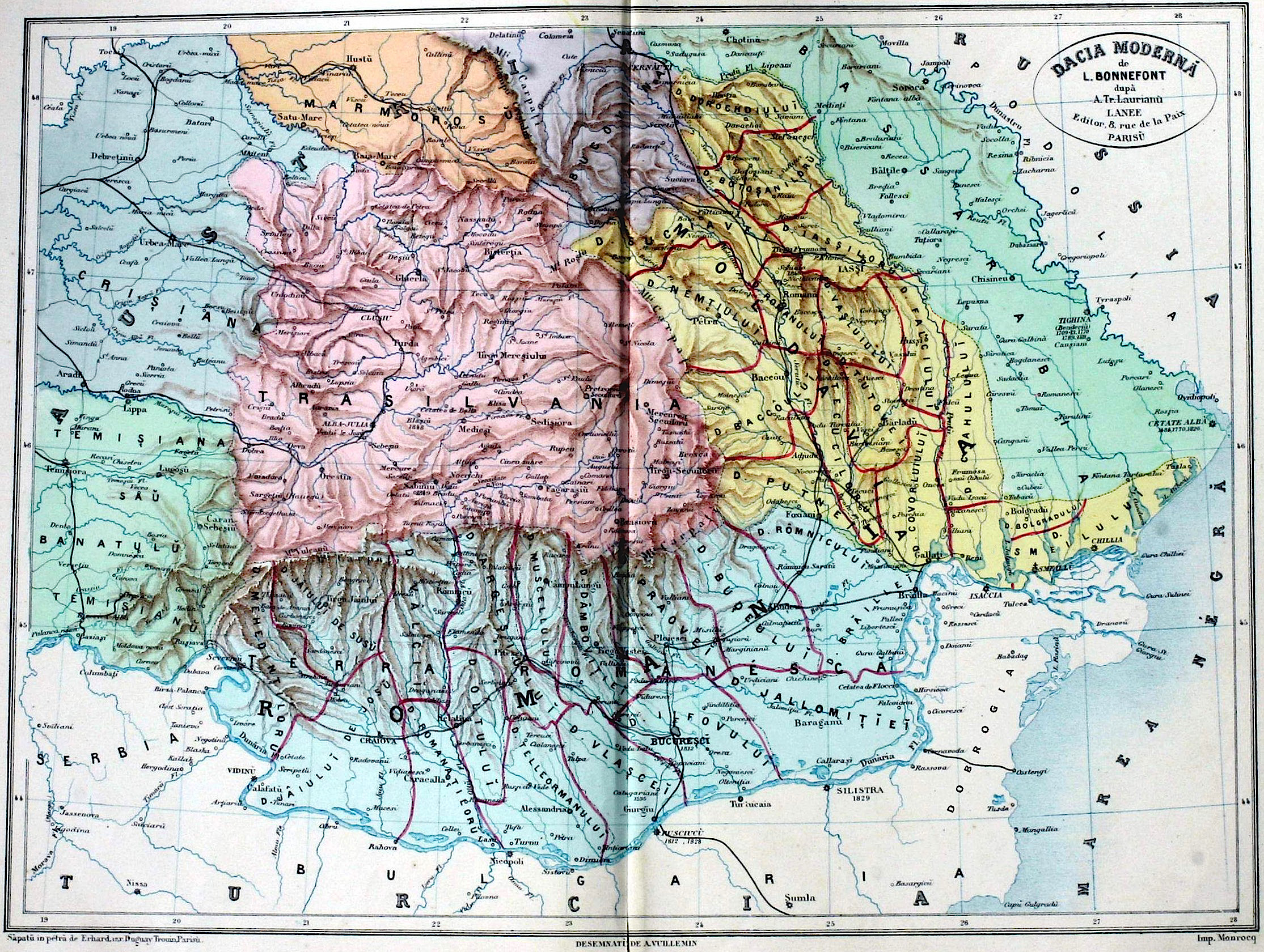 Romania (harta administrativa din 1868) in contextul "Daciei moderne" (spatiul dintre Tisa si Nistru)